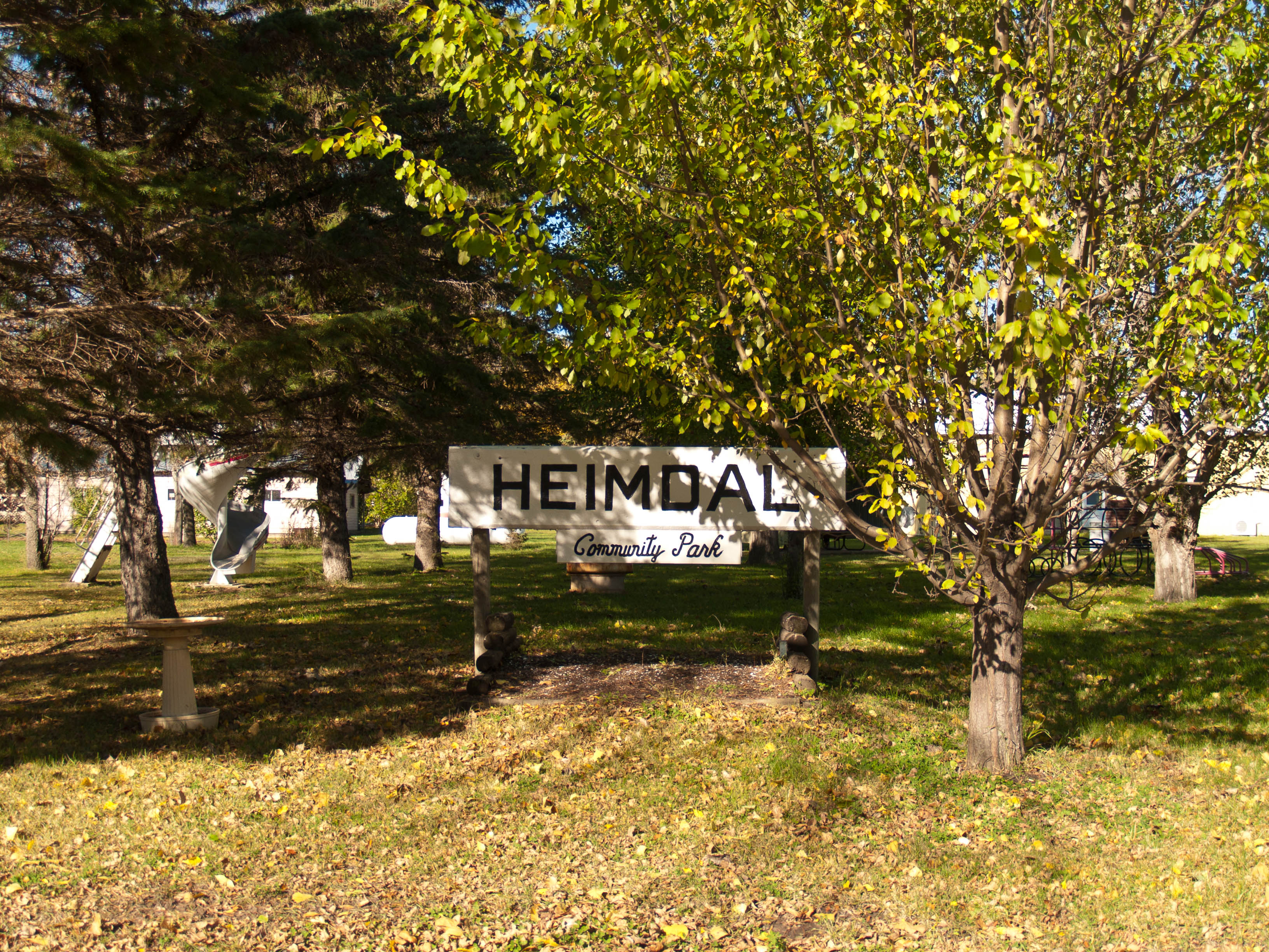 Heimdal, North Dakota